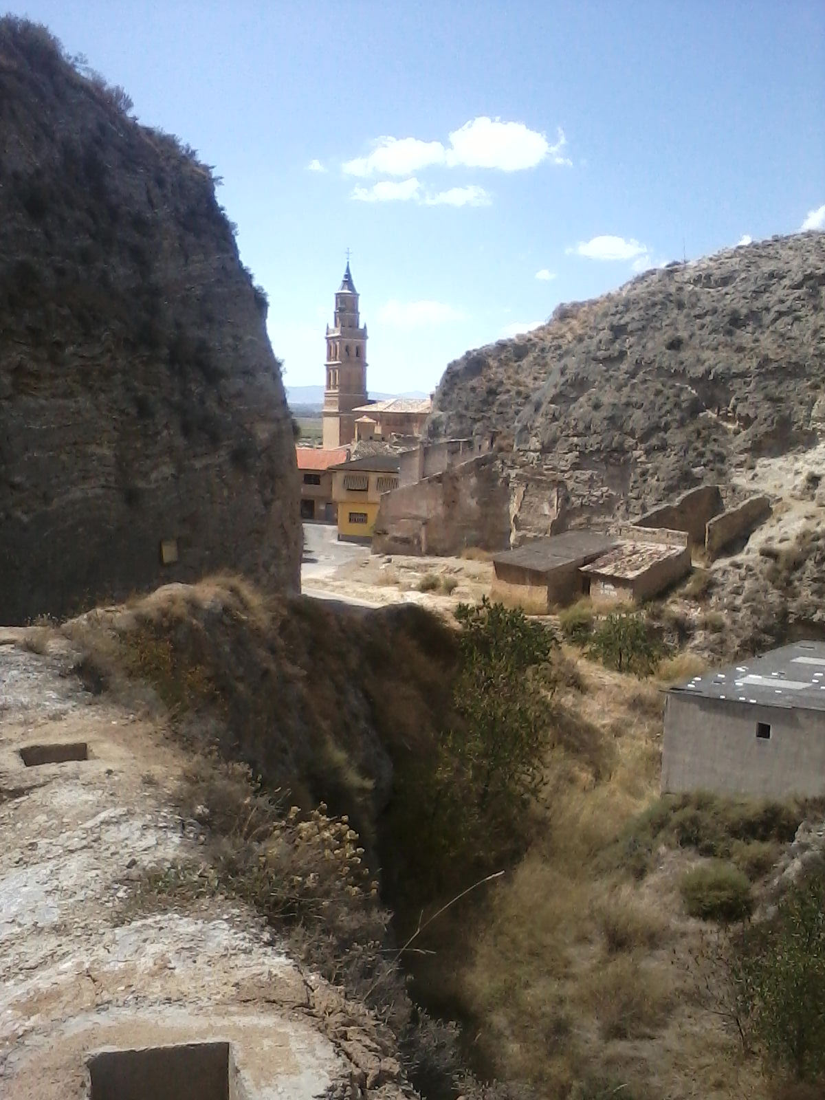 Arguedas. Carrera que va a la Ermita de la Virgen del Yugo.